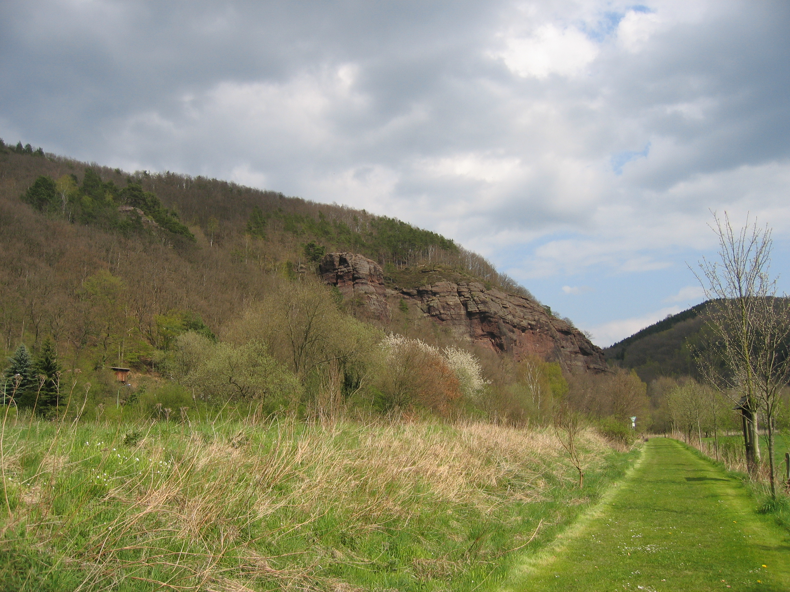 Ein Felsen bei Blens